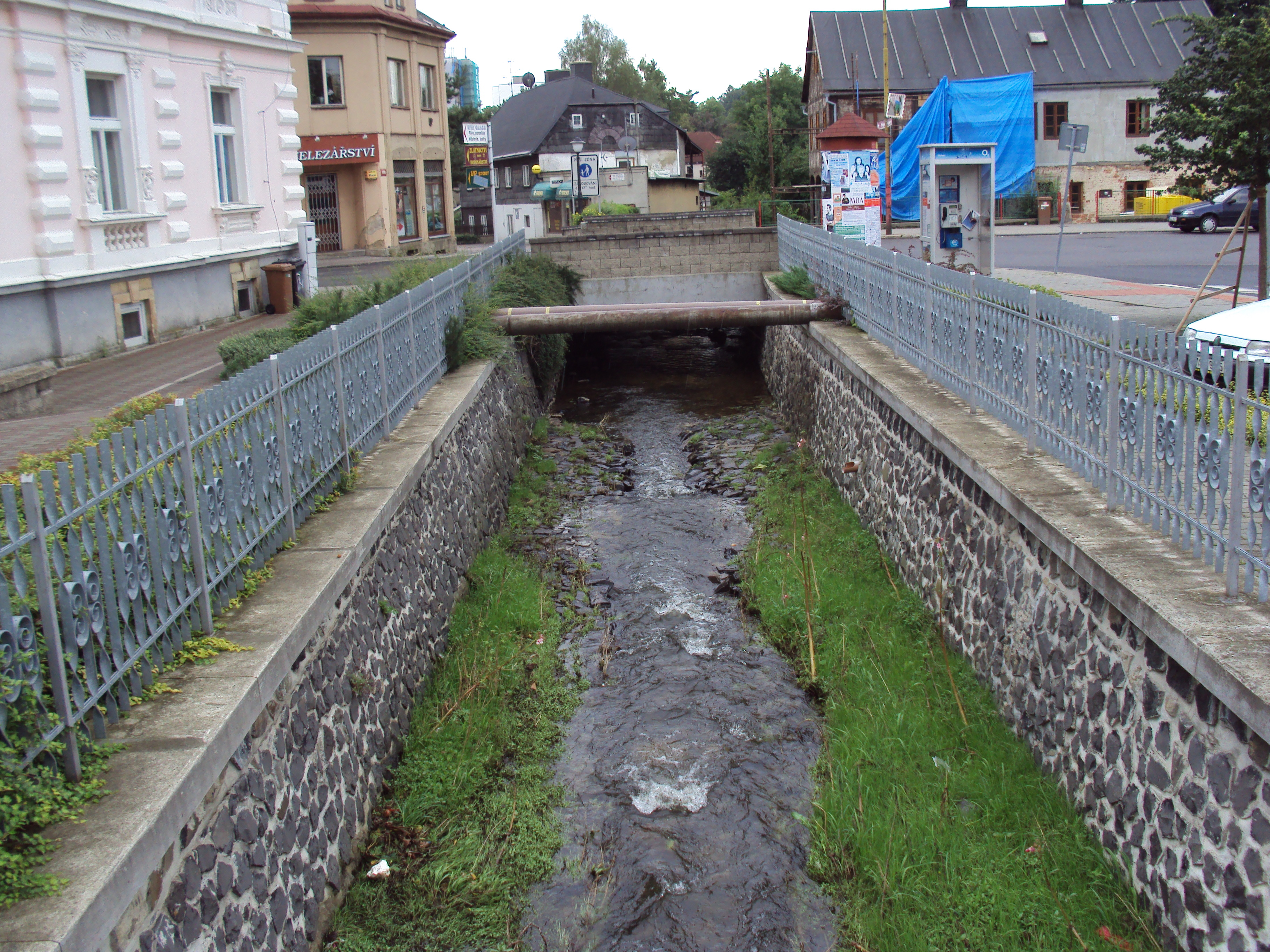 Potok Šporka protéká Novým Borem na jih k Ploučnici